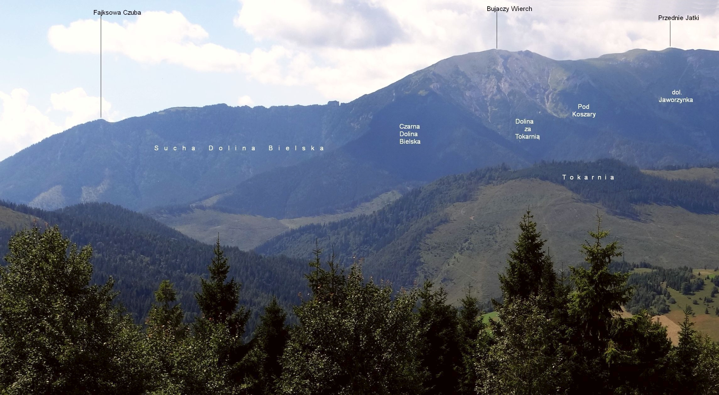 Widok z górnej stacji wyciągu narciarskiego Bachledzka Dolina w Magurze spiskiej